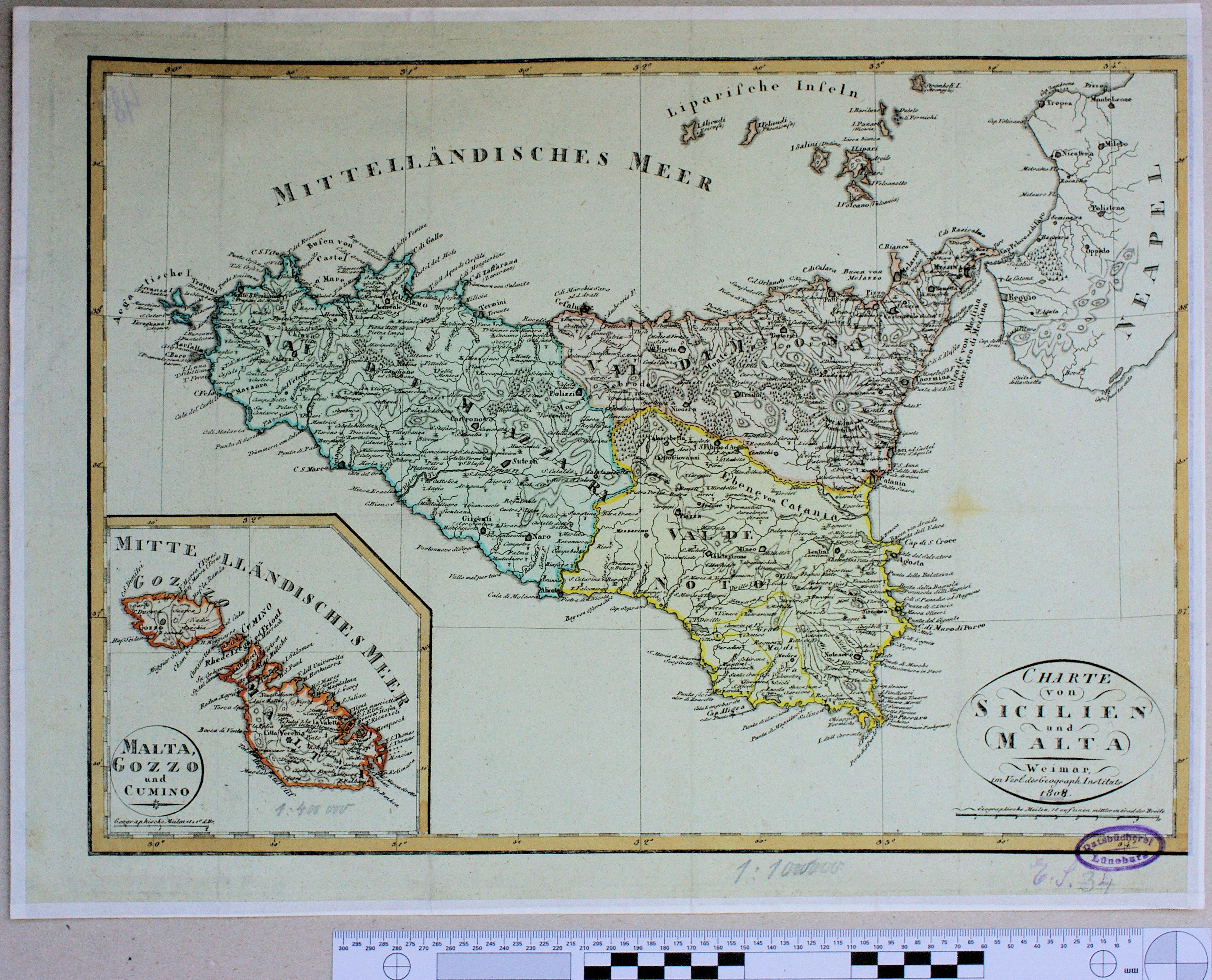 Die Bilder enstanden anläßlich eines Workshops im Rahmen von Skillshare 2010 in Zusammenarbeit mit dem Stadtarchiv Lüneburg. Die Originale wurden freundlicherweise vom Stadtarchiv zur Verfügung gestellt. . Sizilien 1808 Registratur: K43 Nr 28